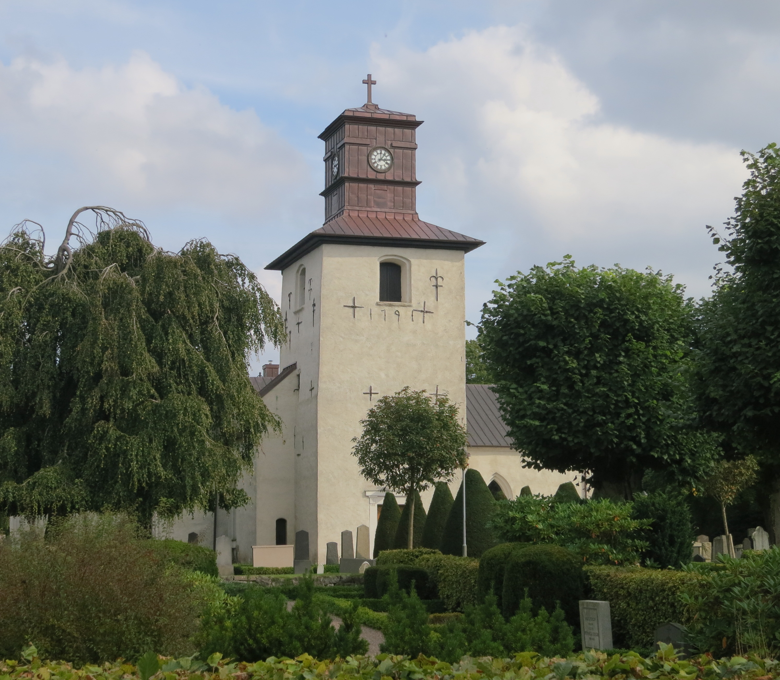 Strövelstorps kyrka (Strövelstorp 46:1)